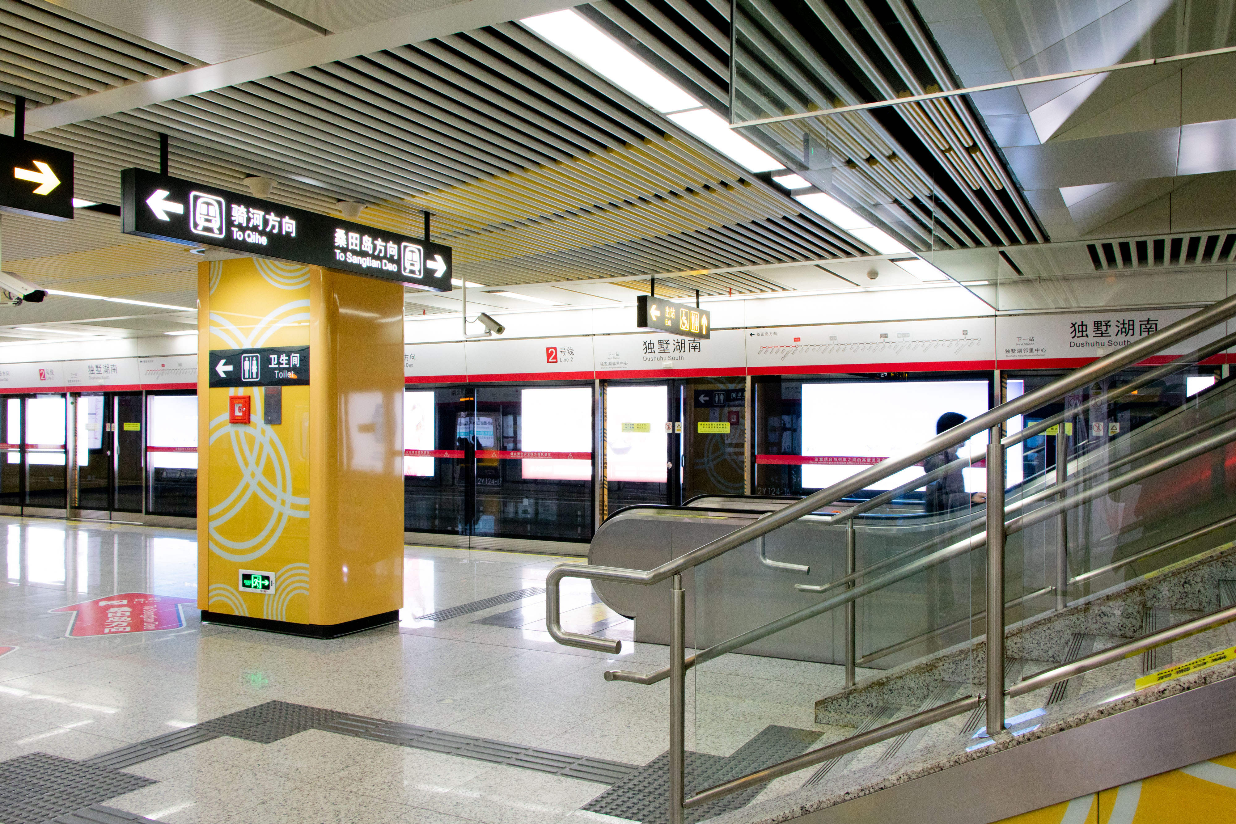 中文（中国大陆）: 独墅湖南站站台